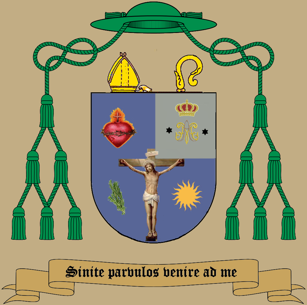 Obispo Gregorio Romero-Escudo episcopal